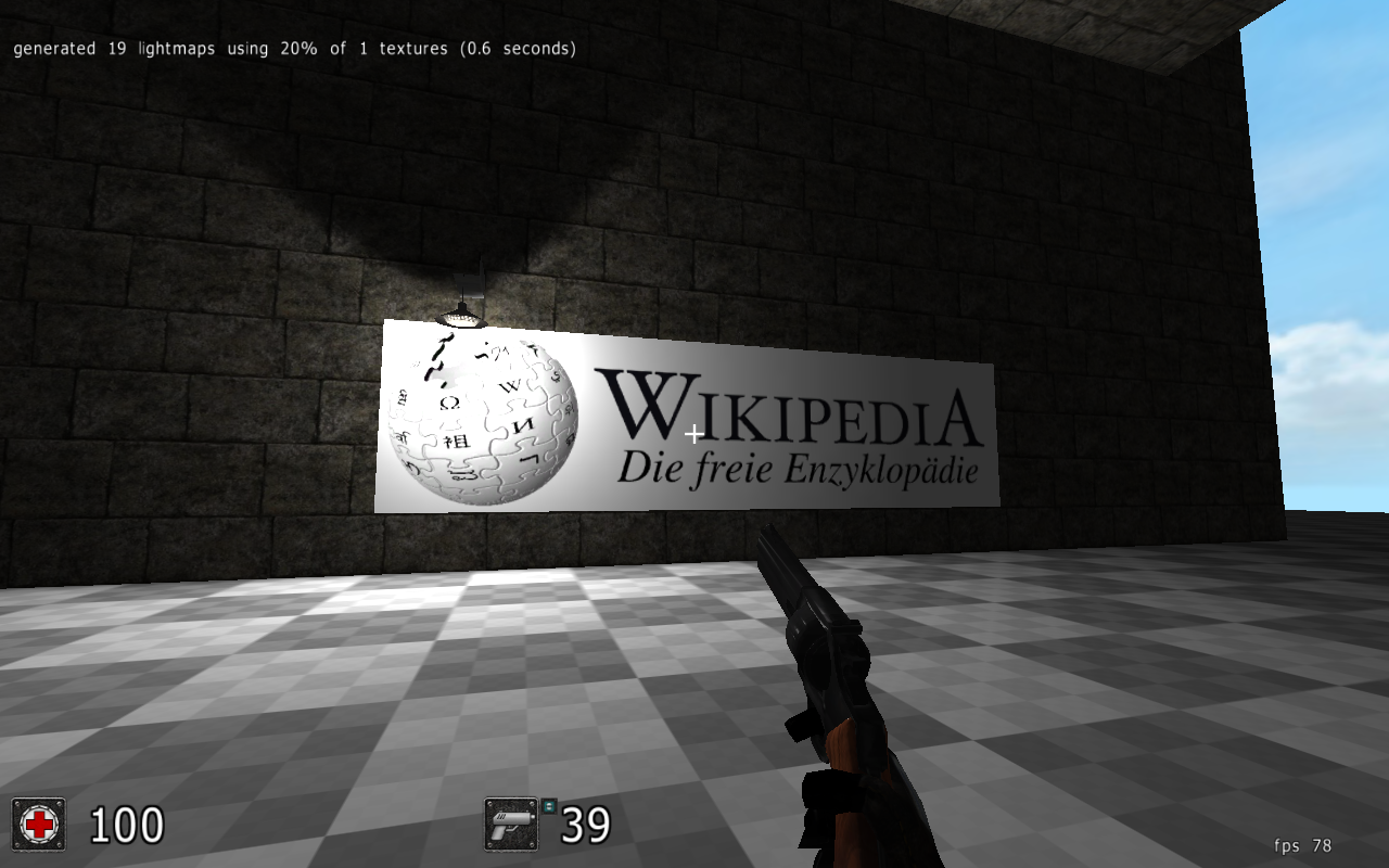 Ein Wikipedia-Logo im Karteneditor von Cube2